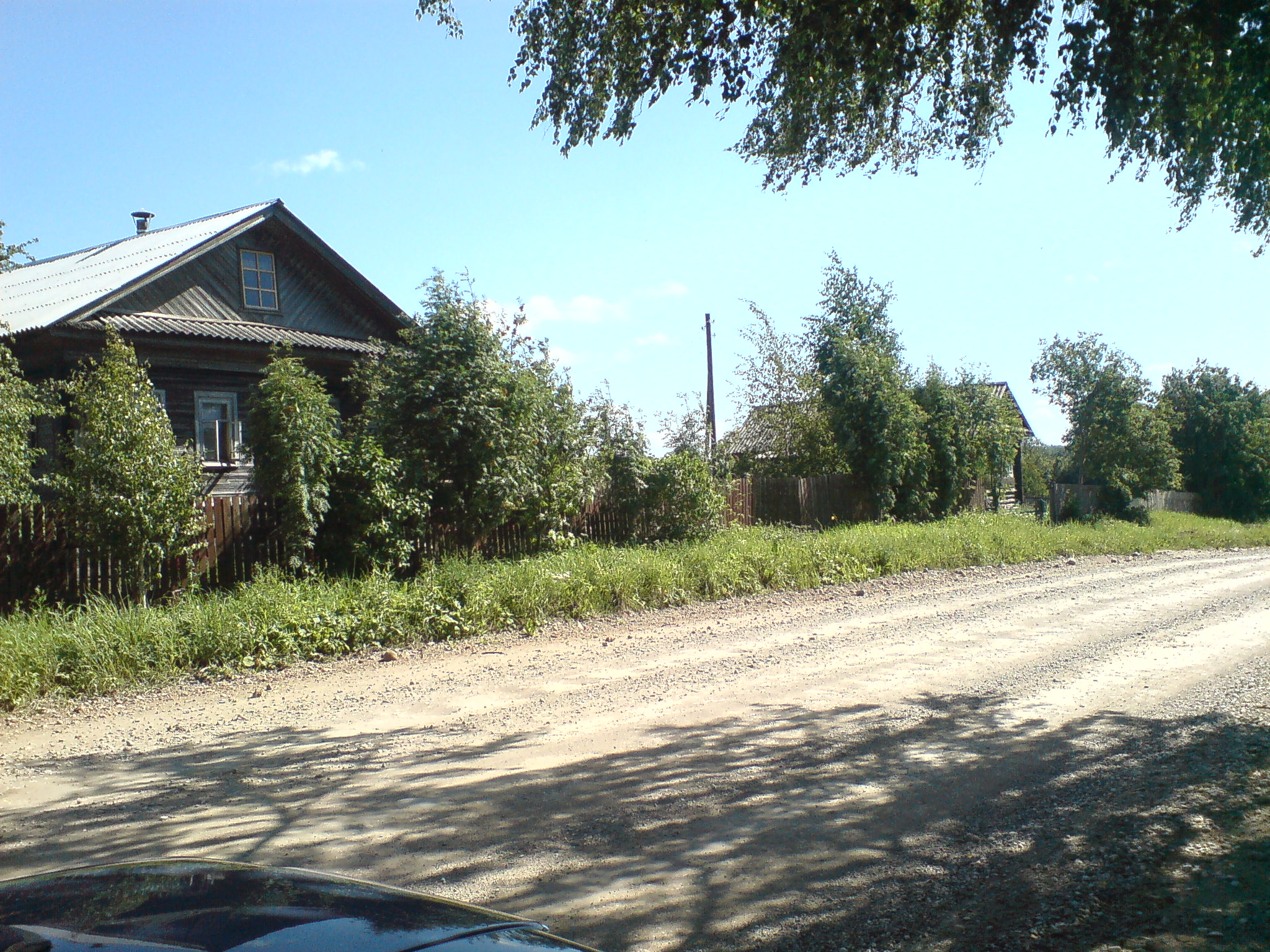 Малое Дивково в Кирилловском районе